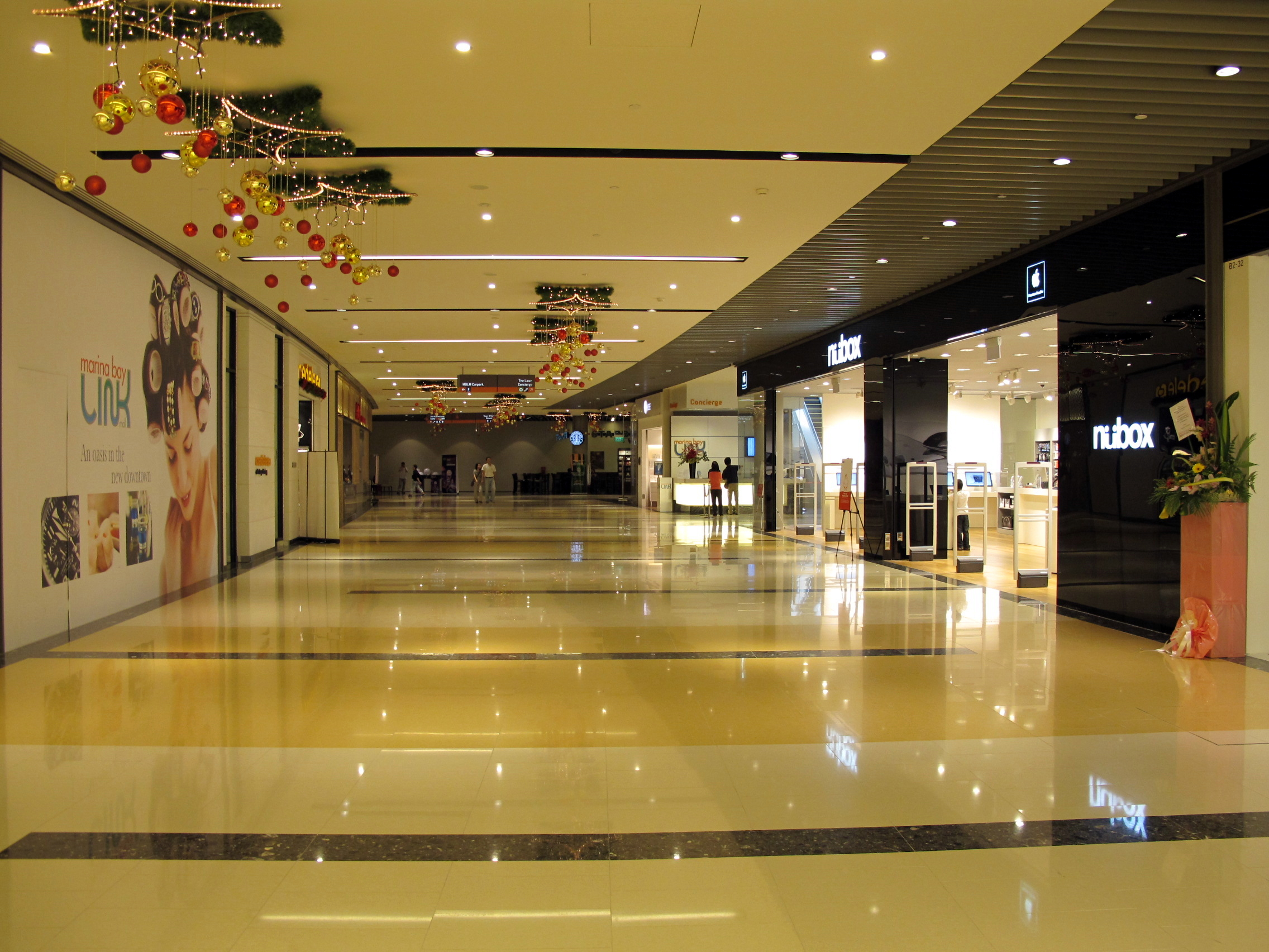 Marina Bay Link Mall